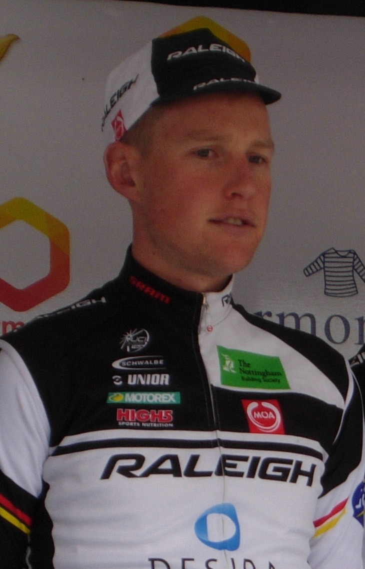 Tour de Bretagne 2013 - Présentation des équipes au départ de la deuxième étape à Ploemel - Équipe Raleigh Depicted person: Sam Witmitz